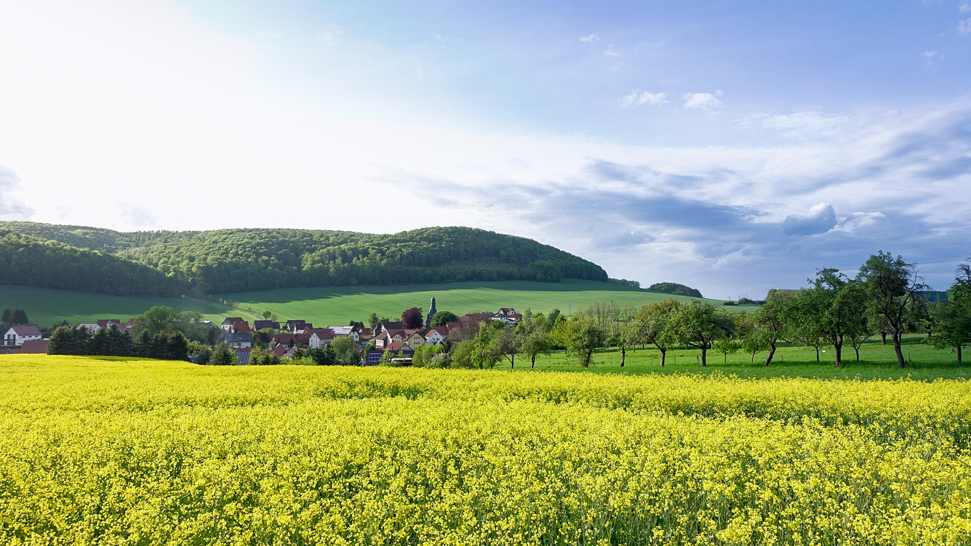 Auf diesem Bild ist Lenterode zu sehen. Im Vordergrund sieht man den Raps blühen. Lenterode liegt im Naturpark Eichsfeld-Hainich und gehört außerdem zu einem Wasserschutzgebiet. Deshalb entstand das Bild im Rahmen des Wikie Loves Earth Days.